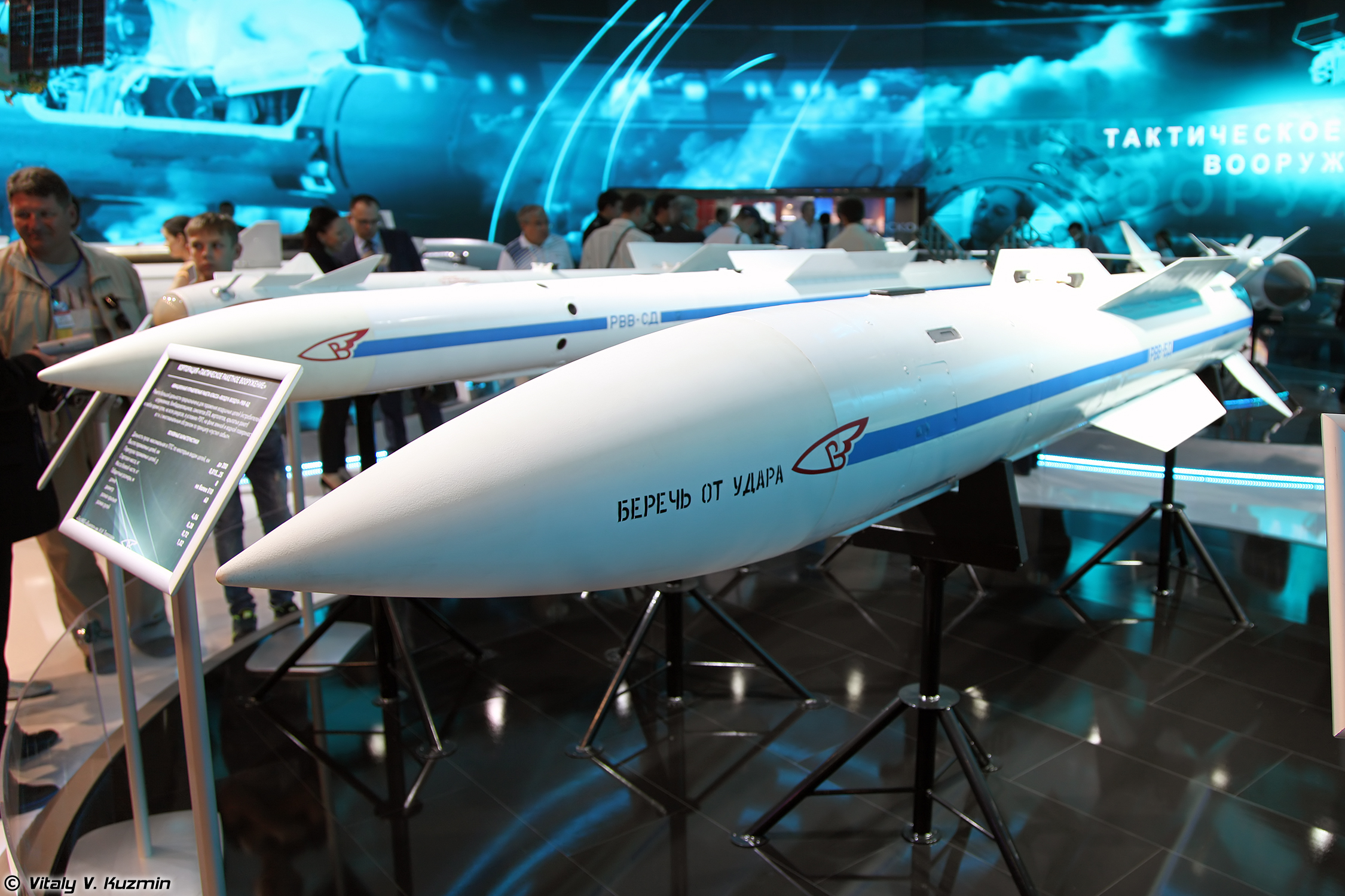 Авиационная ракета РВВ-БД (RVV-BD missile)